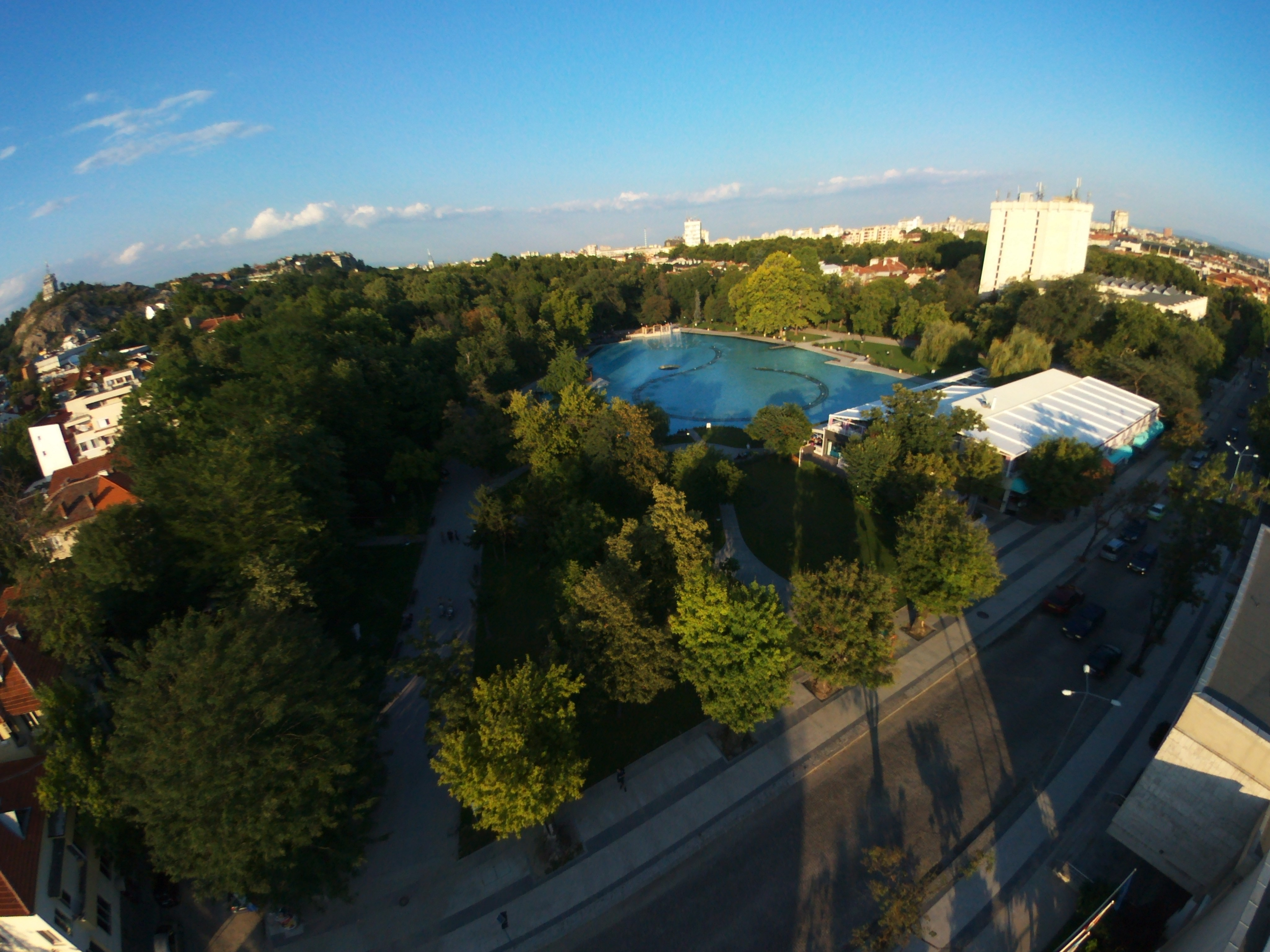 Ten materiał wykonano dronem Parrot Bebop Drone dzięki współpracy z firmą Parrot Polska.Materiały wykonane tym sprzętem możesz zobaczyć w kategorii: Taken with Parrot Bebop Drone. English | polski | +/− The making of this document was supported by Wikimedia Polska. To zdjęcie zostało wykonane podczas Wikiwyprawy 2015.Wszystkie zdjęcia z wyprawy możesz zobaczyć w kategorii: Wikiwyprawa 2015. English | polski | +/− To zdjęcie zostało załadowane dzięki współpracy z firmą Hyperbook. polski | +/− To zdjęcie zostało załadowane dzięki współpracy z firmą: Kopex Group. English | polski | +/−